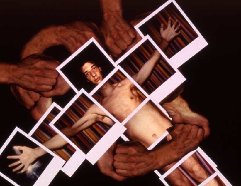 Image extraite de Tableau d'amour, film d'animation de Bériou (création originale).